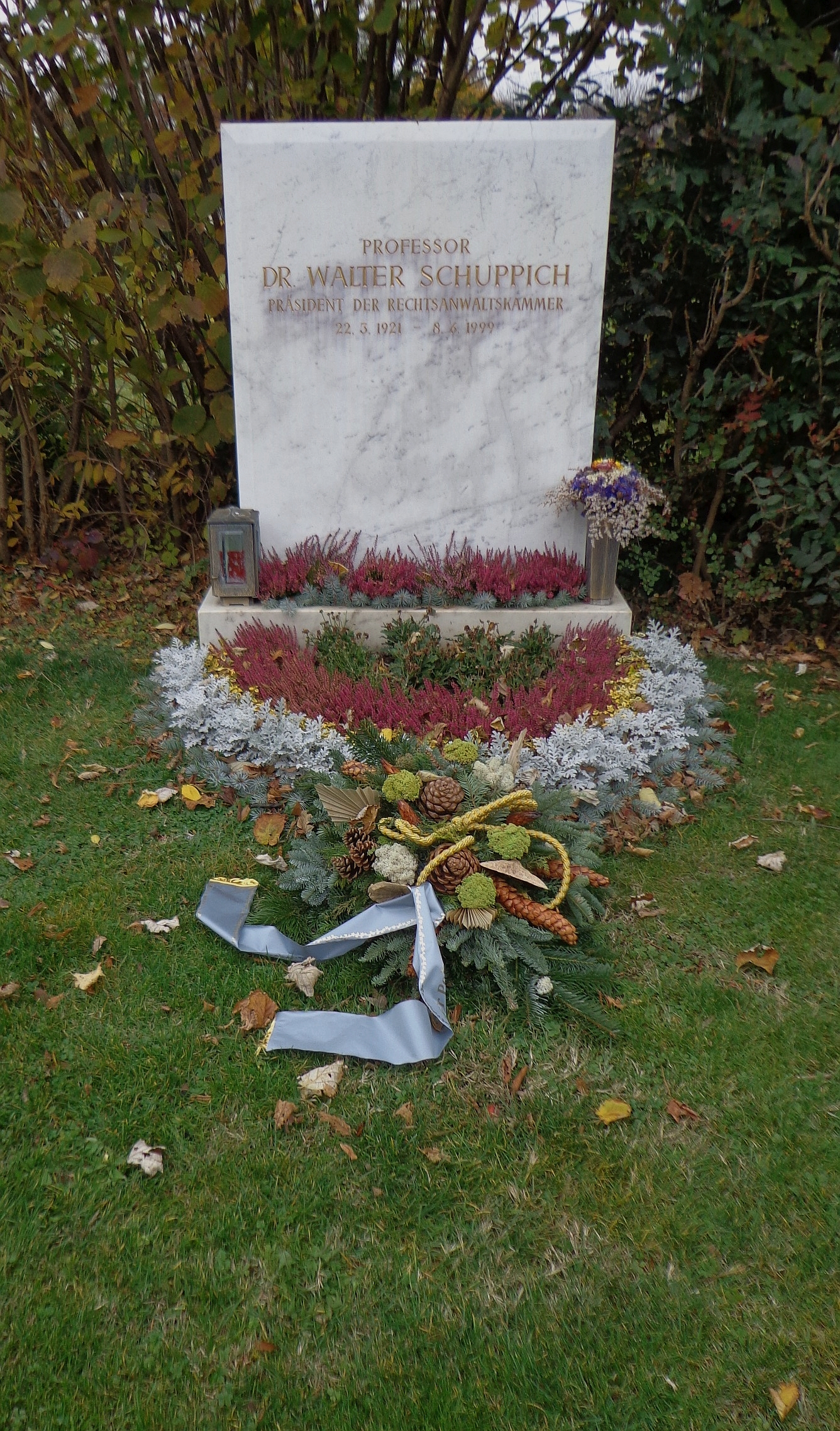 Wiener Zentralfriedhof - Gruppe 15 G, Ehrengrab von Walter Schuppich